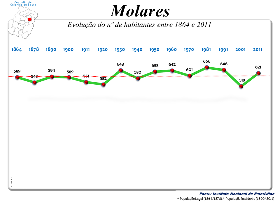 Censos 1864/2011